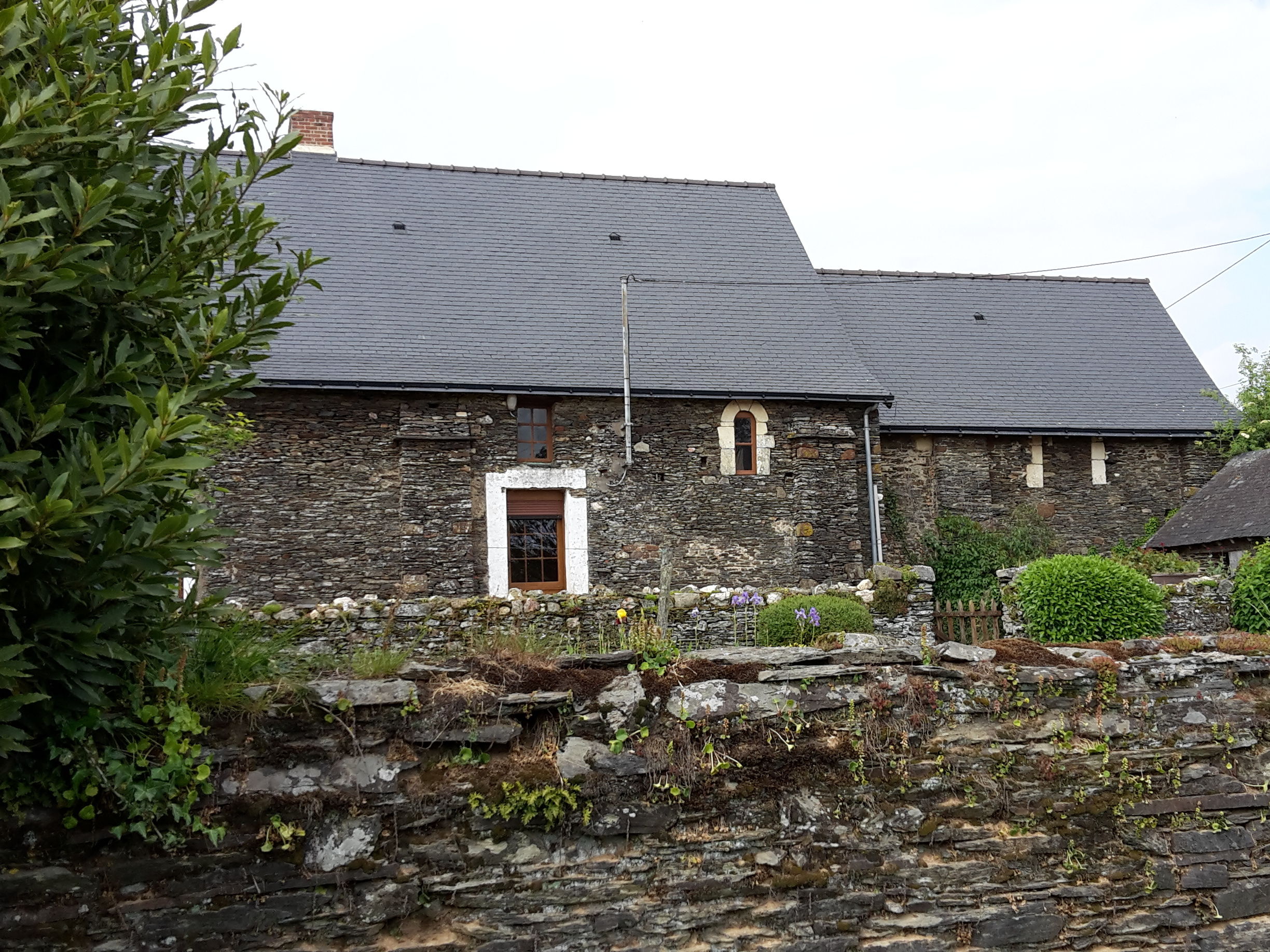 Ancienne église de Rochementru, Le Pin, Loire-Atlantique, France.